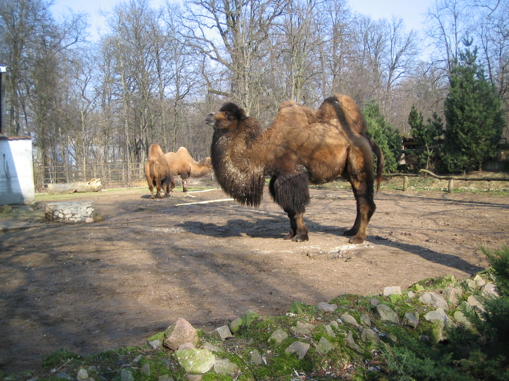 Kupranugaris. Lietuvos zoologijos sodas, 2007-03-10